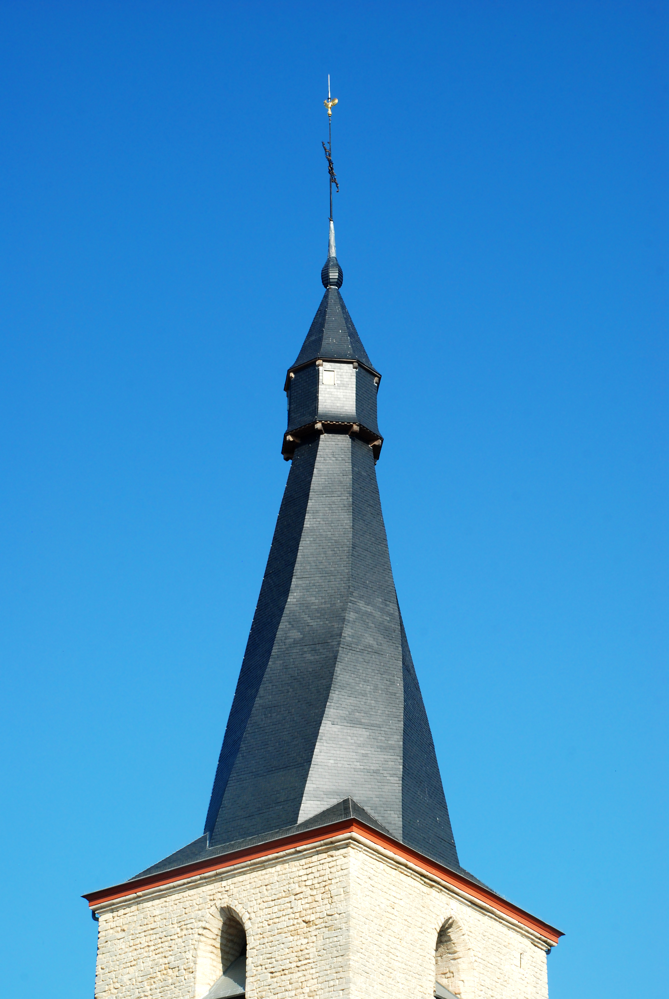 Belgique - Brabant wallon - Chapelle Notre-Dame-du-Marché (Jodoigne)